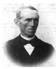 Jacobus Van Rompuy - Begijnendijk - Vlaams-Brabant - België